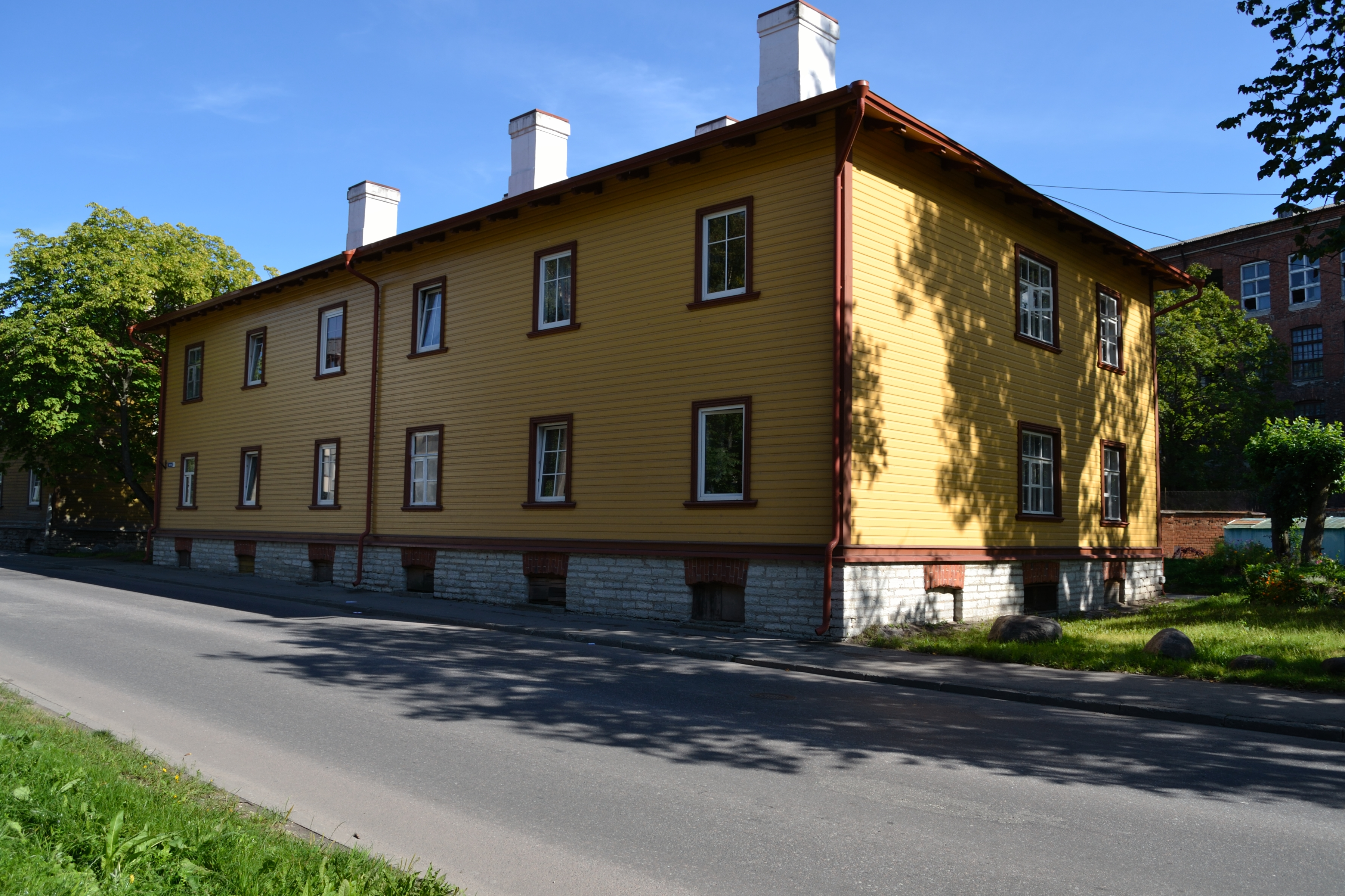 Tallinn, Balti Puuvillavabriku tööliselamu Sitsi 11, 1901-1905